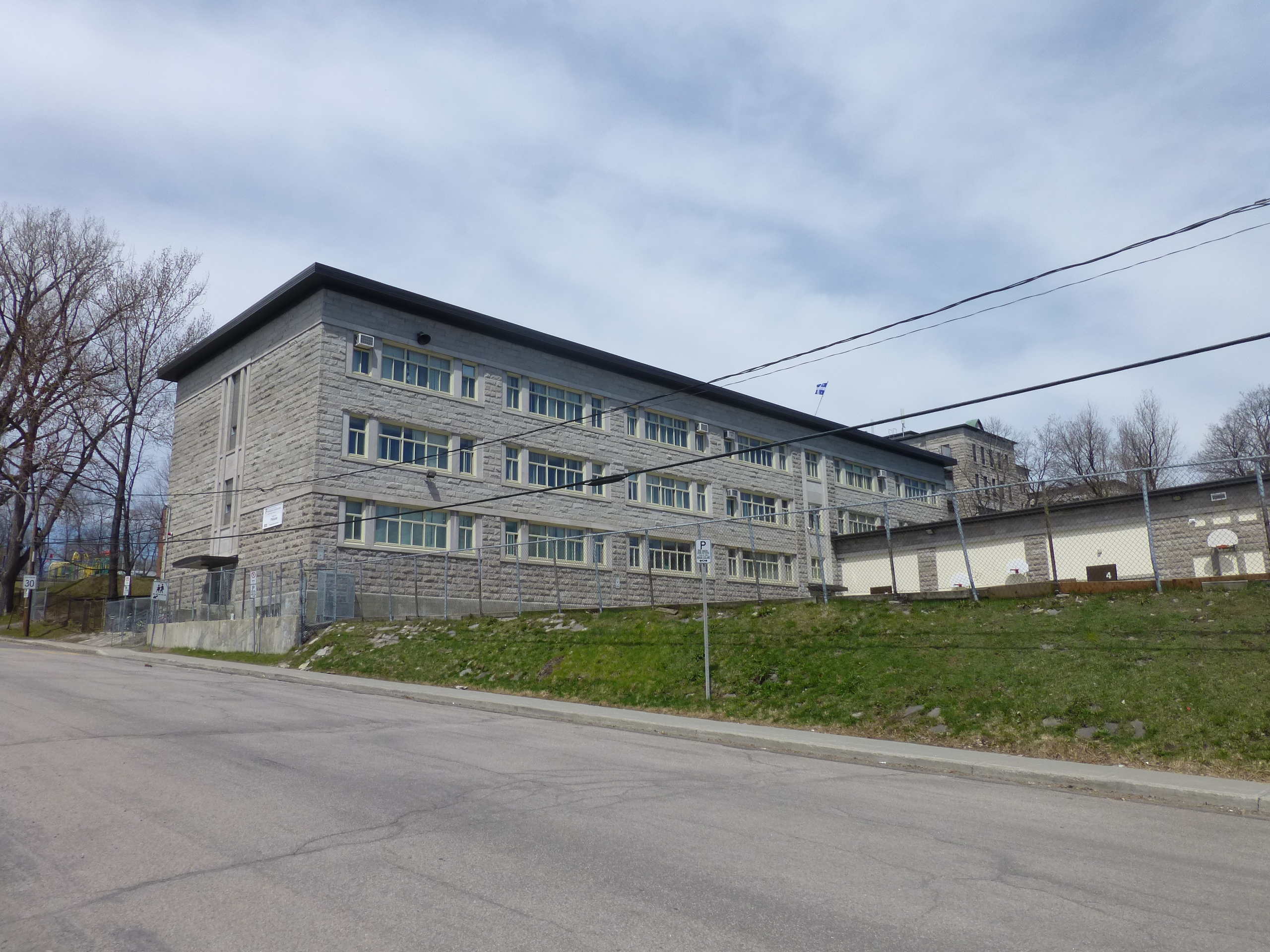 École de la Pléiade, avenue Renouard, arrondissement Beauport, Québec (Canada)